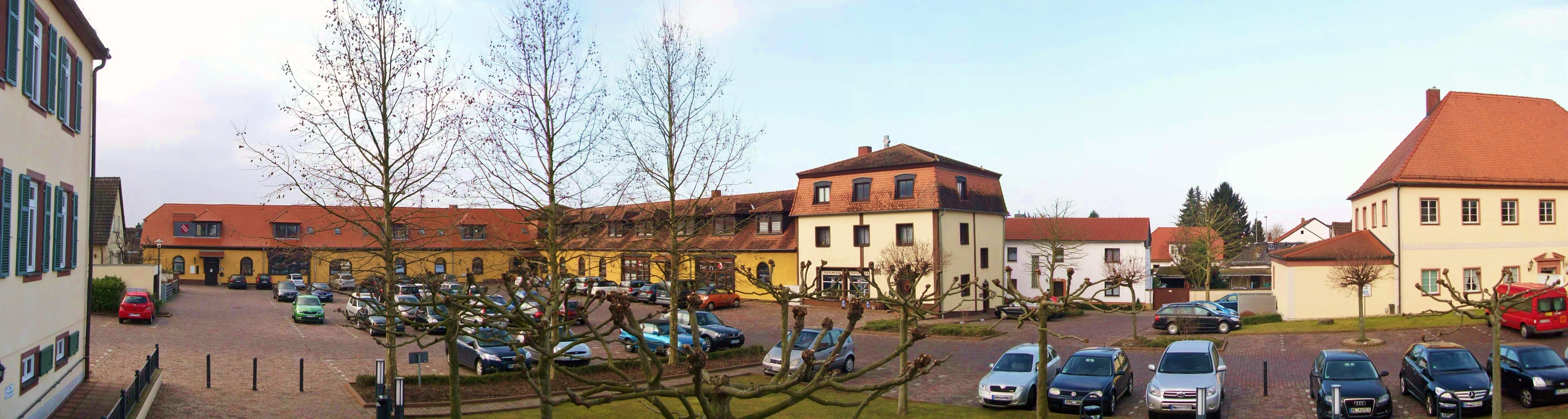 Teil der Gesaamtanlage al Panorama; linker Bildrand: Großer Bau (Rathaus), mittig der ehemalige Innenhof (Parkplatz), dahinter die Gebäude entsprechen dem ehemaligen Wirtschaftshof, rechter Bildrand: das ehemalige Herrenhaus